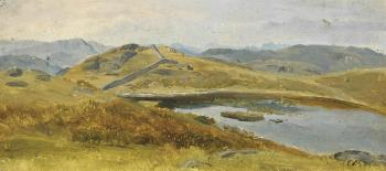 Emma Landseer (verh. McKenzie): A Lowland Landscape, 1844. Öl auf Papier, 14.6 x 33 cm.